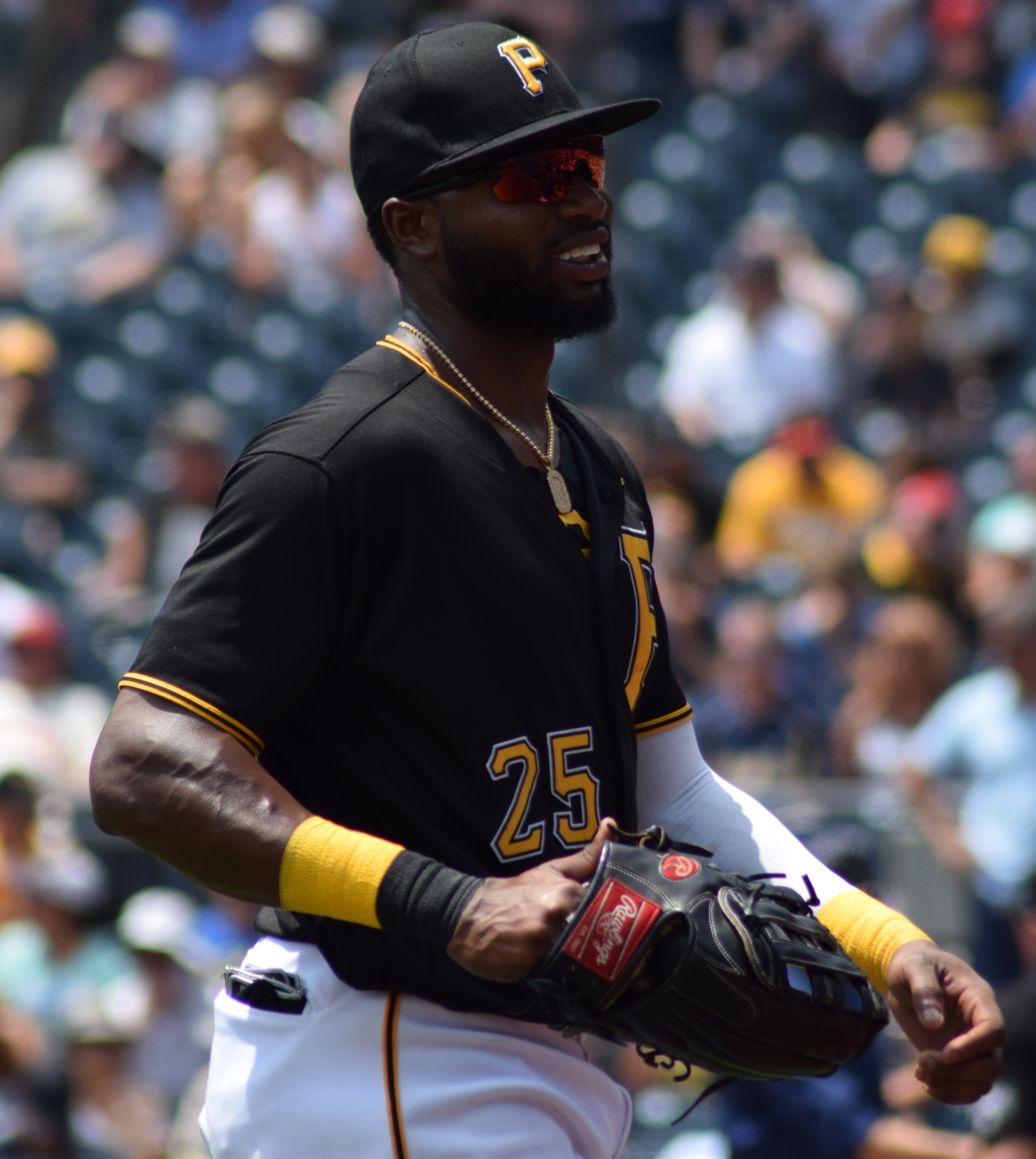 Gregory Polanco